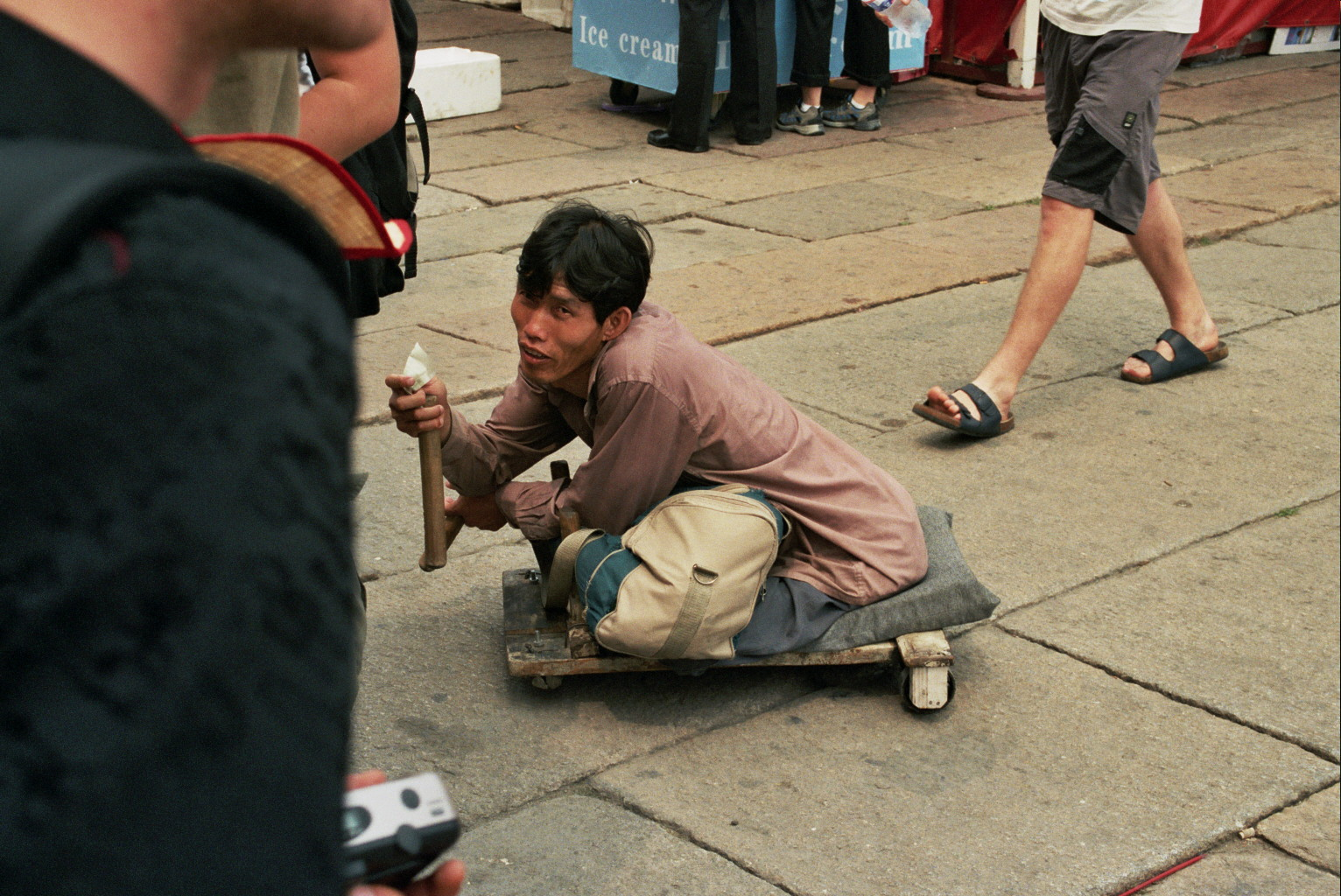 Ein Bettler vor der verbotenen Stadt in Peking.